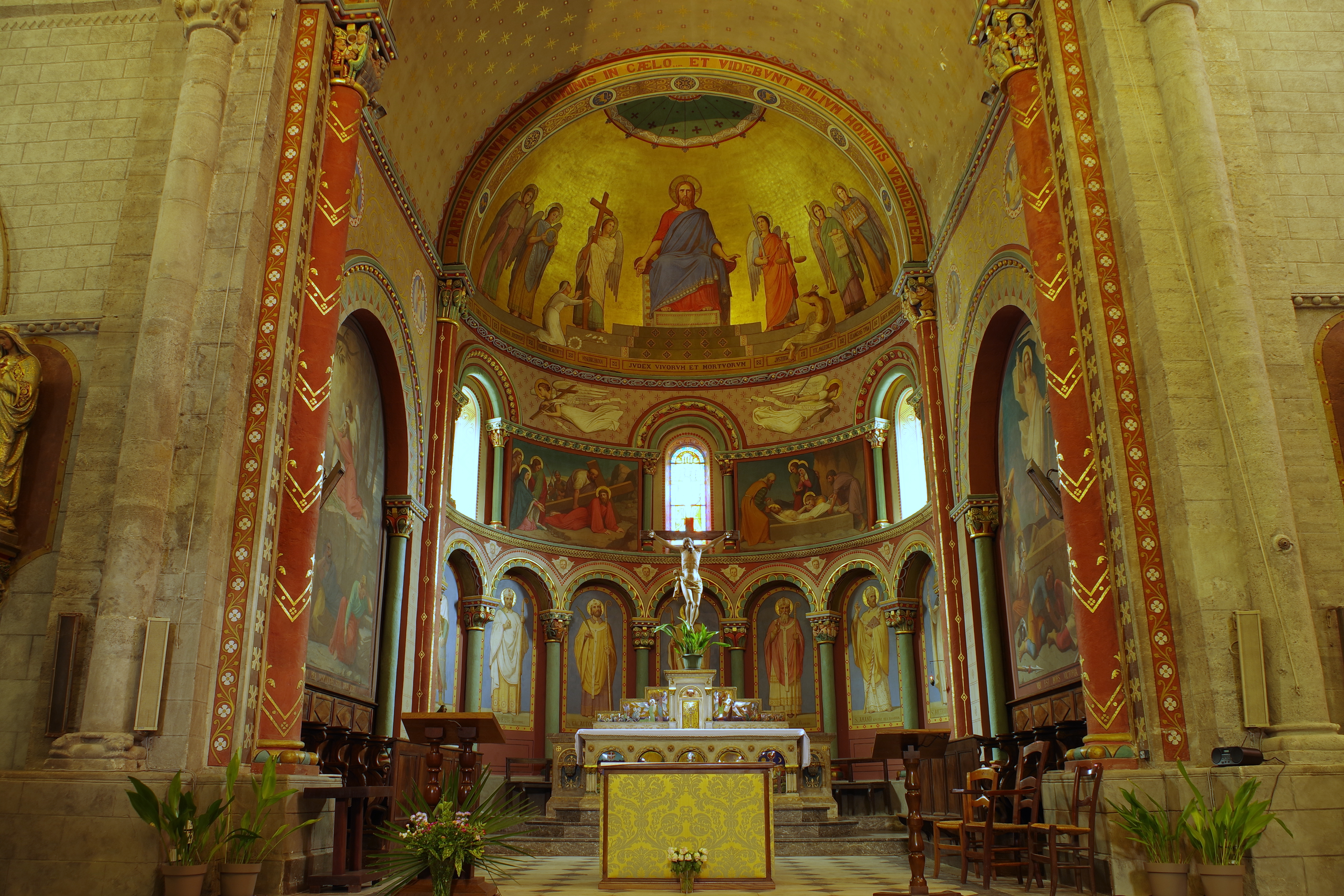 Abside, peintures de Romain Cazés et décoration de Bertrand Bernard, son élève. Christ portant la Croix au fond de l'abside